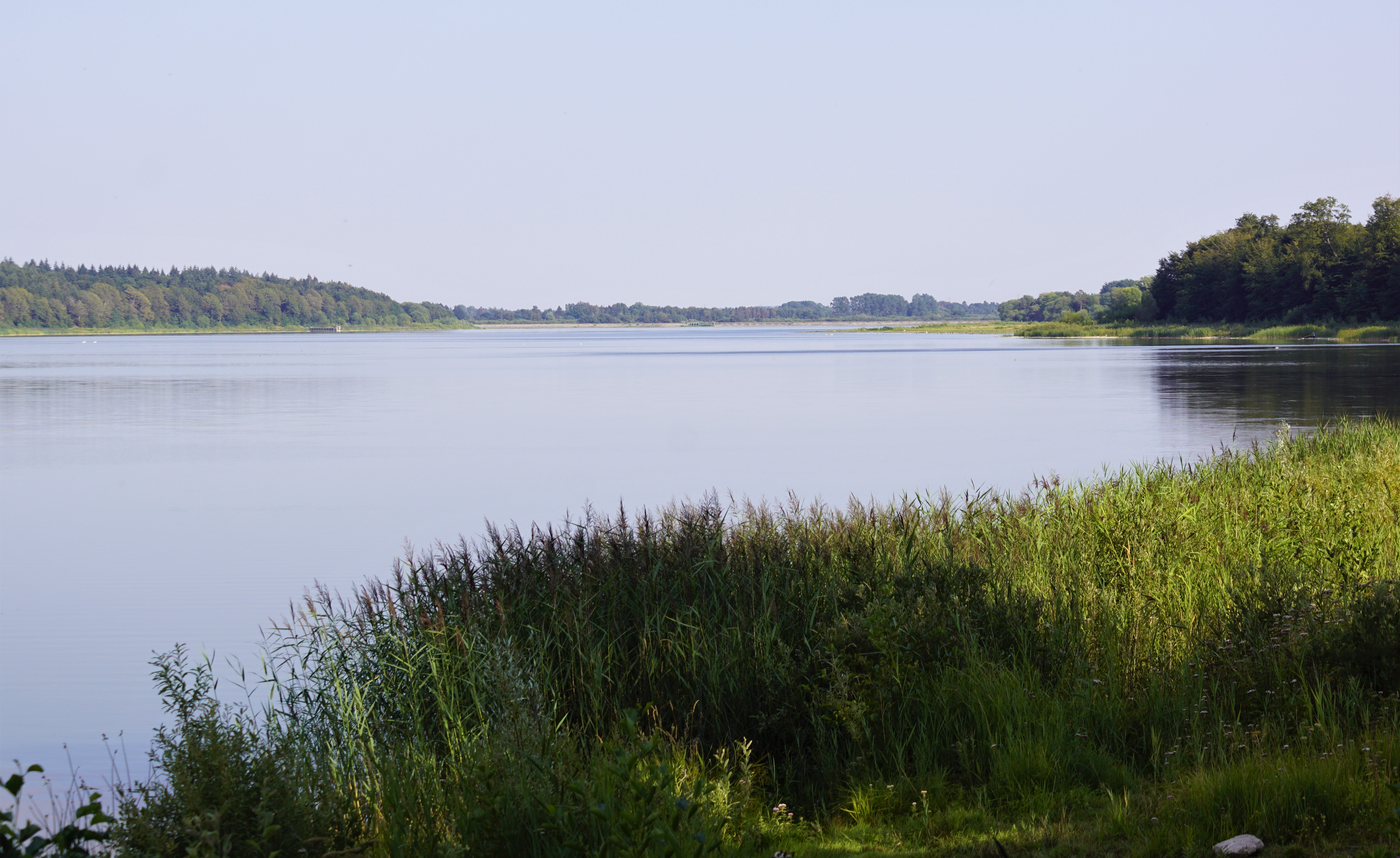 Gyrstinge Sø set mod øst